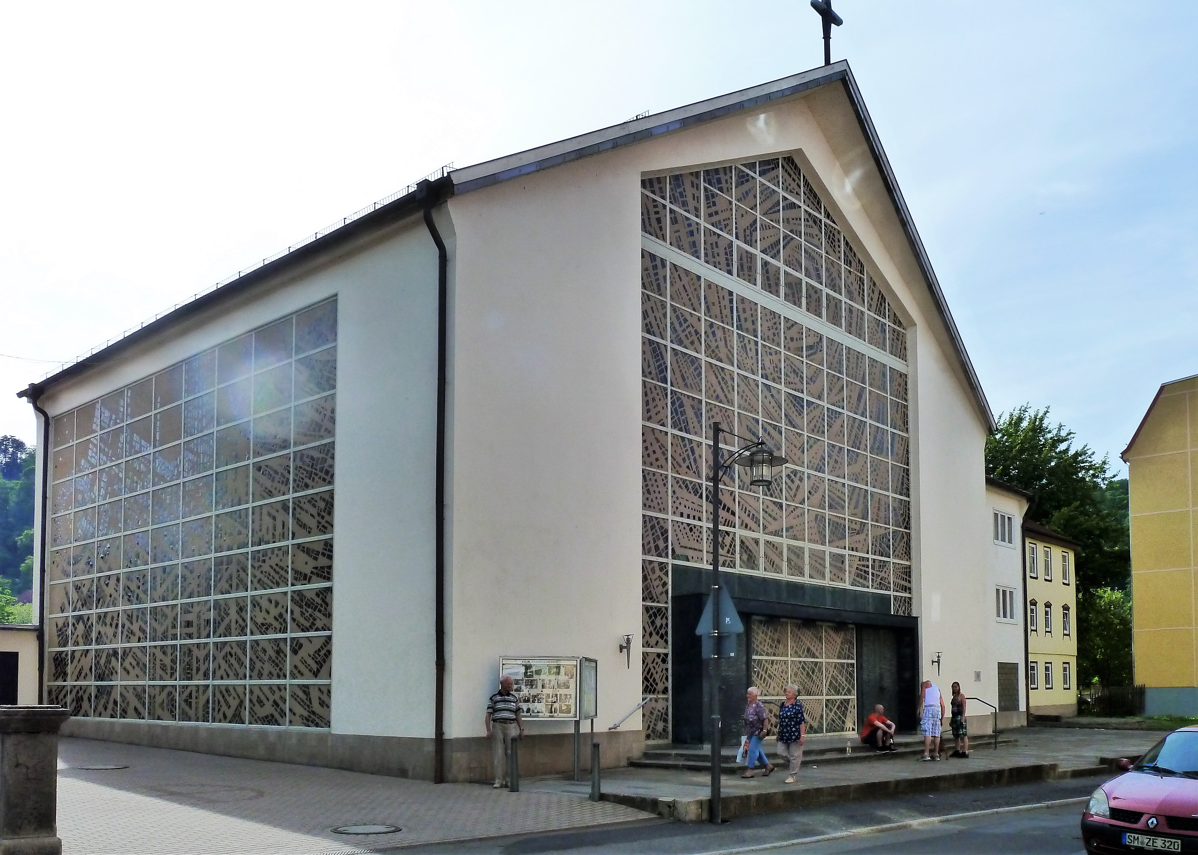 Katholische Pfarrkirche Unsere liebe Frau in Meiningen